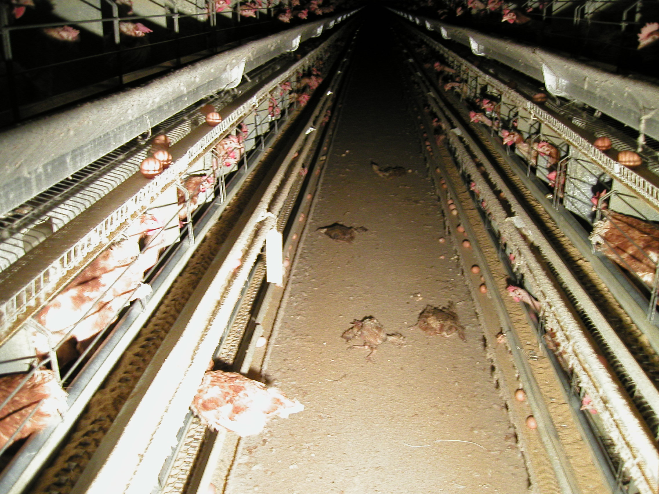 Legebatterie in Deutschland, Niedersachsen (2004) Ich versichere hiermit, dass ich den Beitrag selbst verfasst habe und willige ein, ihn unter der GNU-Lizenz für freie Dokumentation zu veröffentlichen. I, the author of this work, hereby publish it under the following license